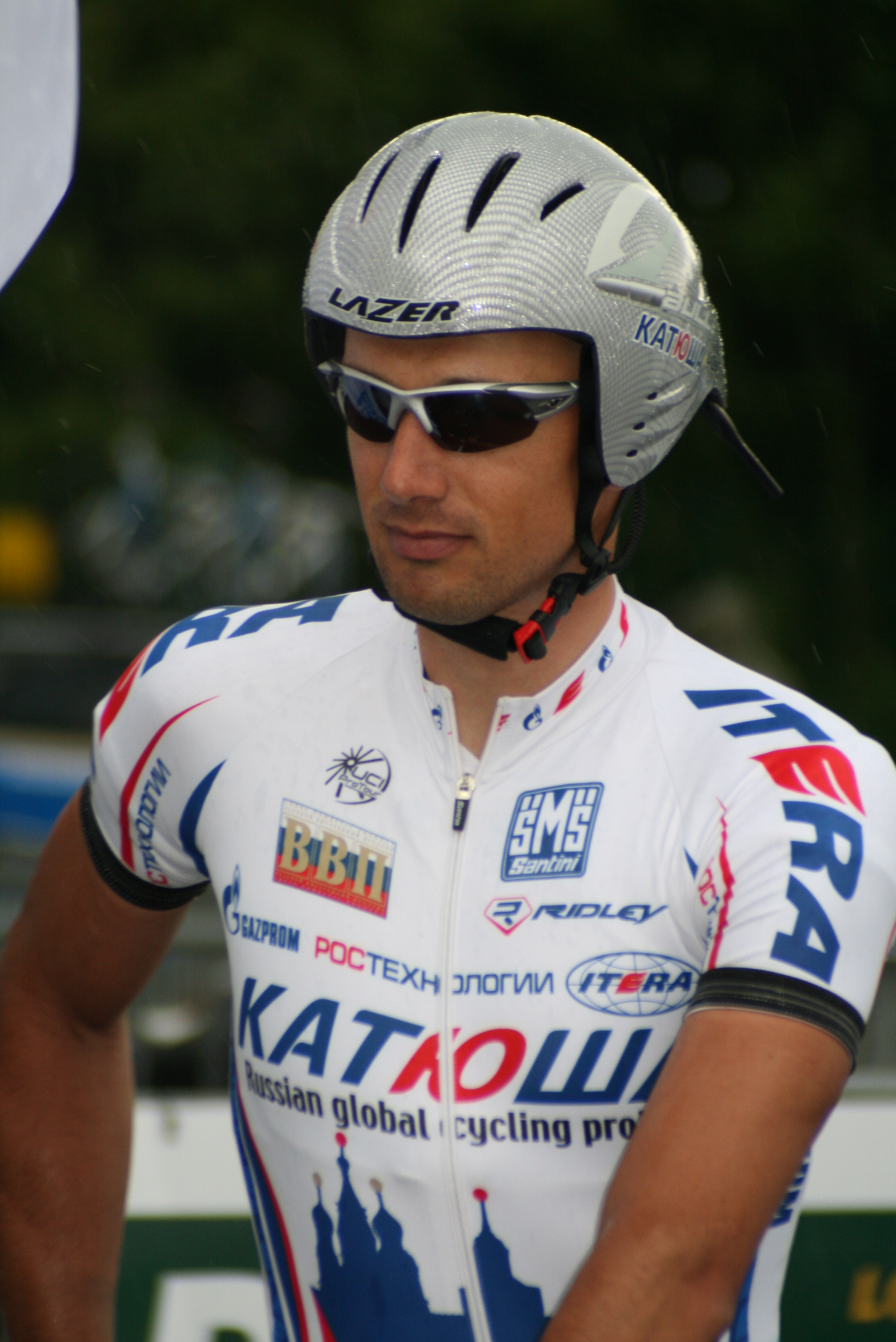 László Bodrogi, durant les Quatre jours de Dunkerque 2009, à Douai